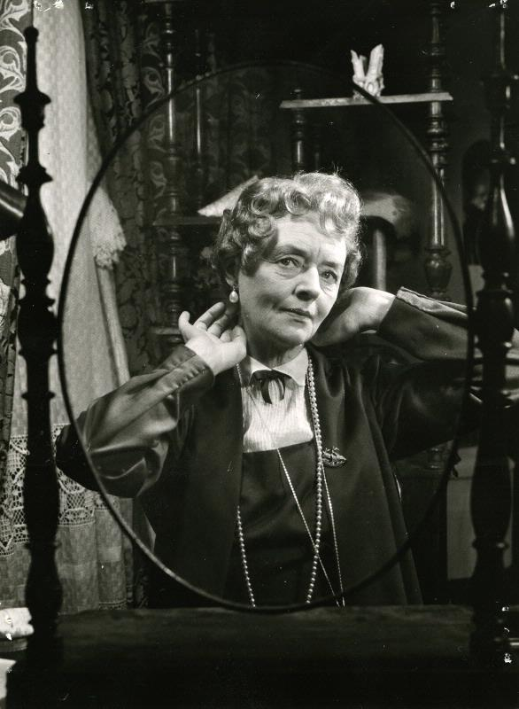 Dagny Stenius i Dubbelspel på Helsingborgs stadsteater.